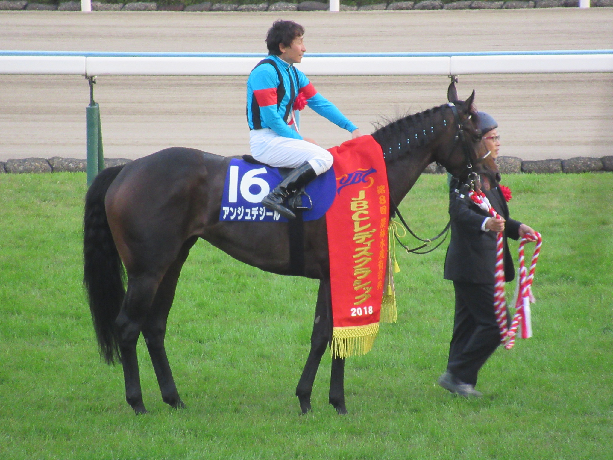 2018年 JBCレディスクラシック優勝馬 アンジュデジール号。京都競馬場にて。